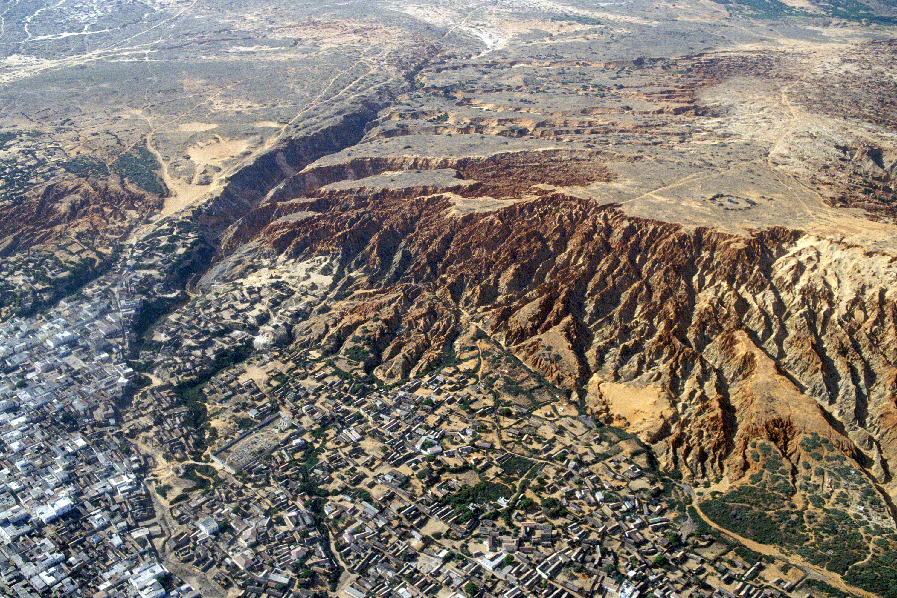 An aerial view of the Somali landscape shows a Somali city at the foot of a vast plateau.